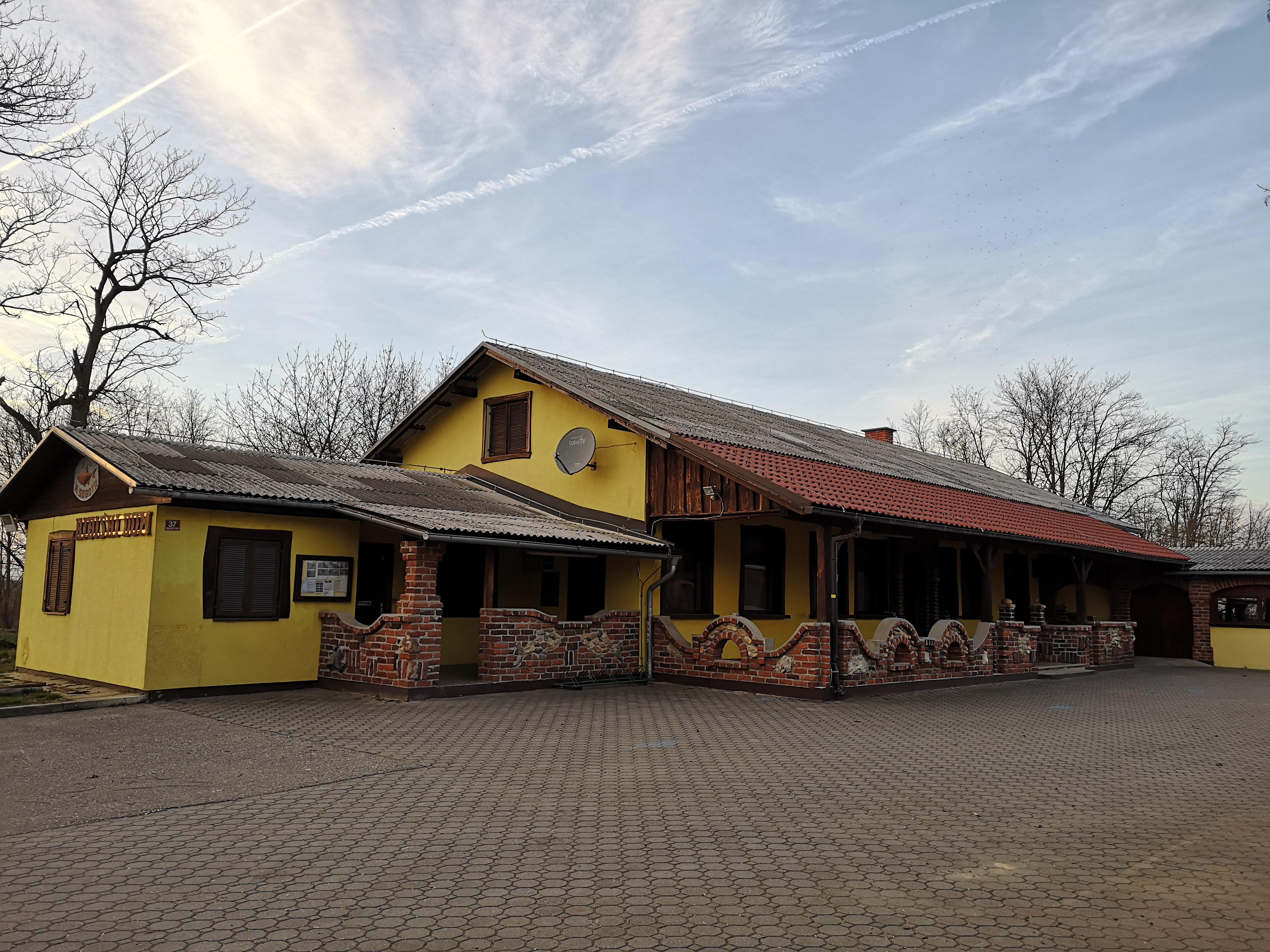 Fotografija ribiškega doma Ribiške družine Murska Sobota, ki se nahaja v Murski Soboti ob Soboškem jezeru.